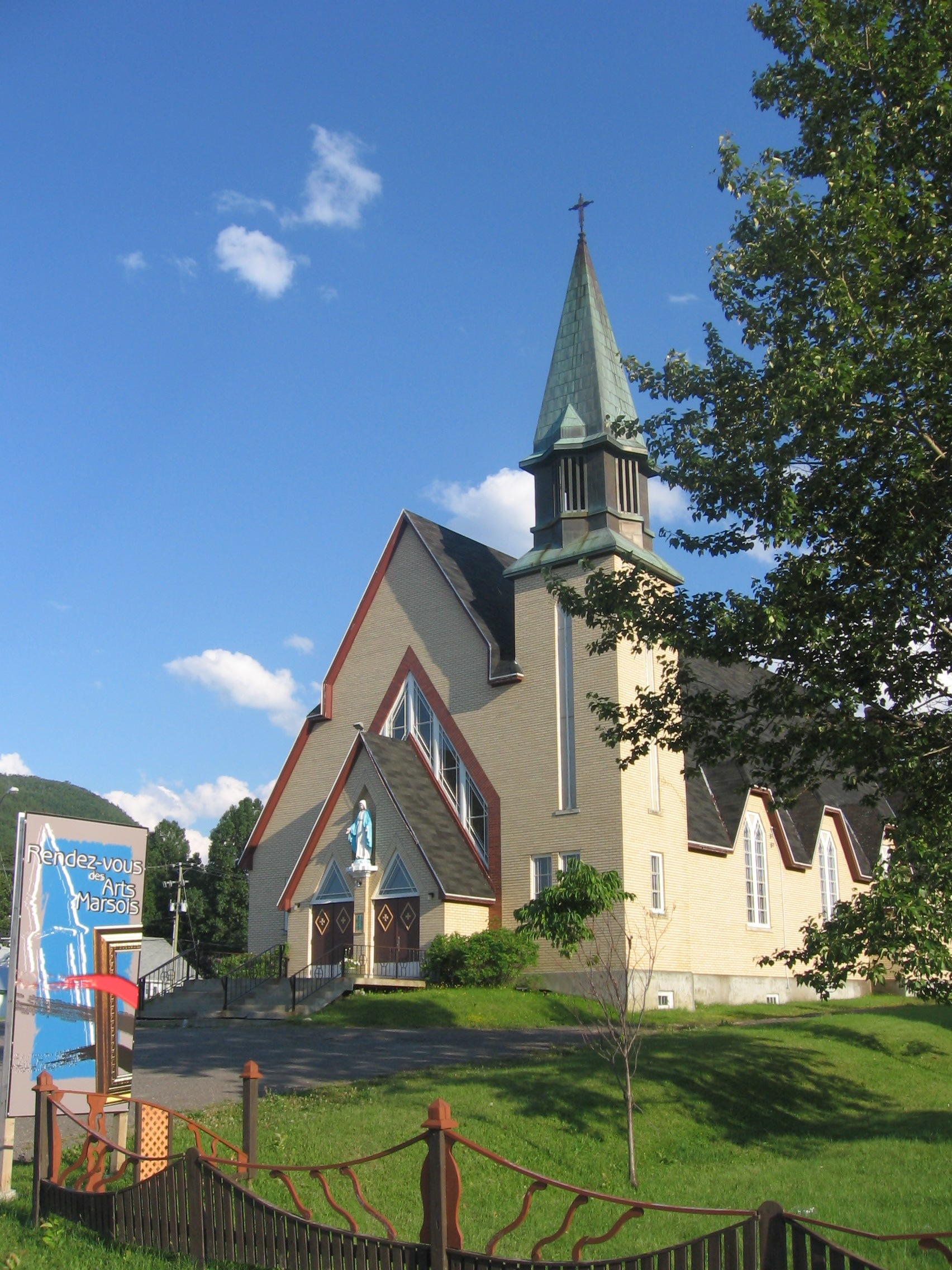 Église de Marsoui